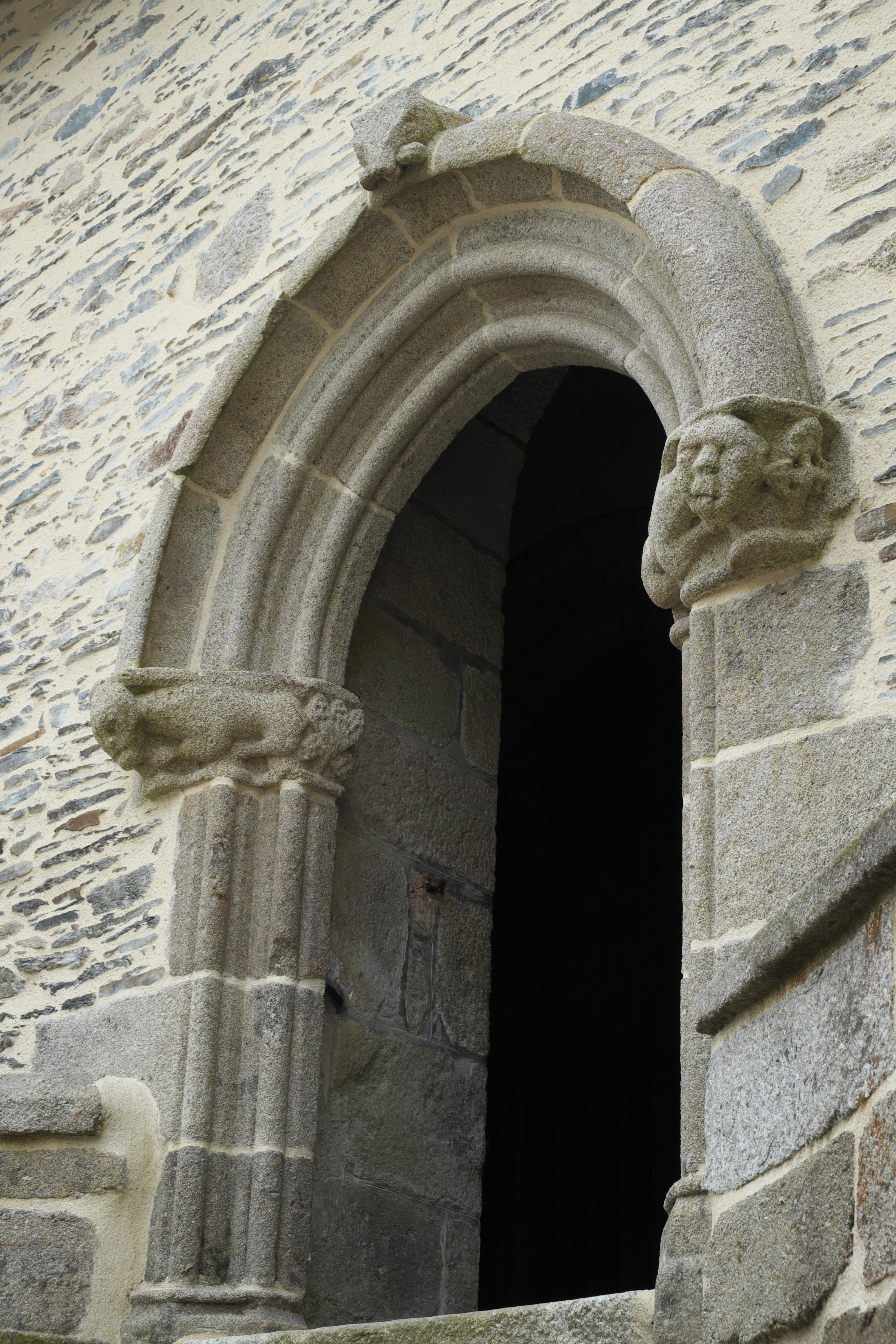 Kapelle Saint-Herbot in Saint-Herbot (Plonévez-du-Faou) im Département Finistère (Region Bretagne/Frankreich), Nordportal